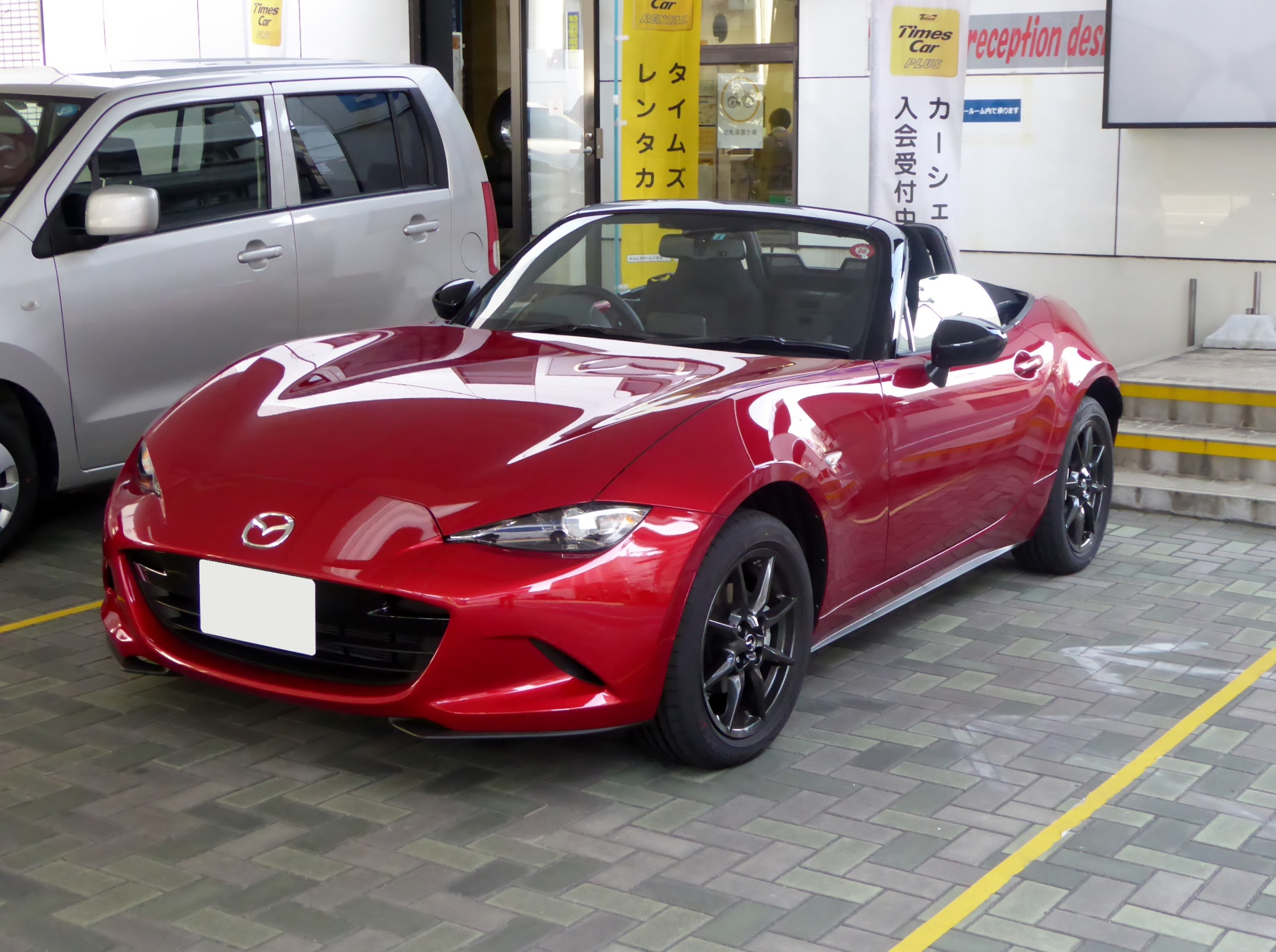 ND型マツダ・ロードスターSスペシャルパッケージをフロントから撮影。